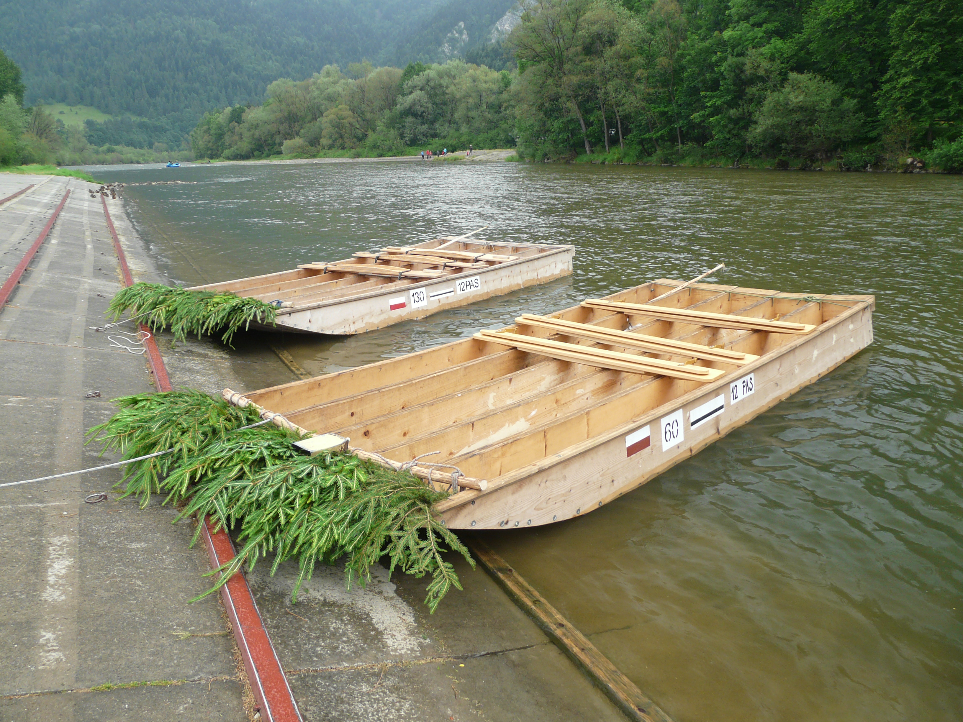 Łódź flisaków pienińskich, składa się z połączonych pięciu pojedynczych łódek o długości 6m, szerokość całej łodzi wynosi ok. 1,8 m z przodu i 2,2 m z tyłu.